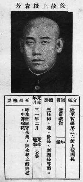 中文（台灣）: 抗戰軍人忠烈錄第一輯中的烈士遺像